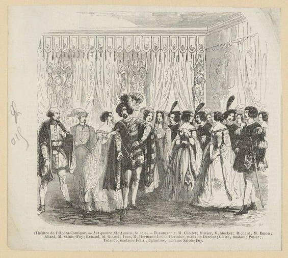 Les quatre fils Aymon, opéra-comique d'Adolphe de Leuven et Léon-Lévy Brunswick : acte 3. Estampe parue le 15-07-1844, artiste inconnu.15,5 x 16 cm. Bibliothèque nationale de France